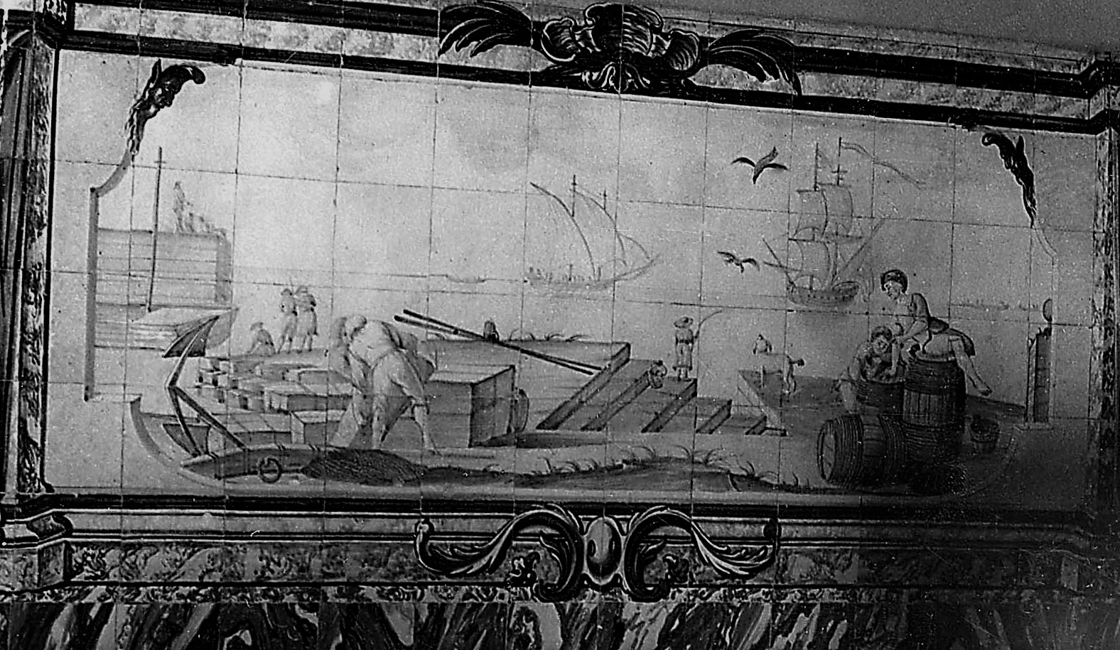 Rua Guarda-Mor 20, 2°, Lisboa, Portugal, ornamento de azulejos